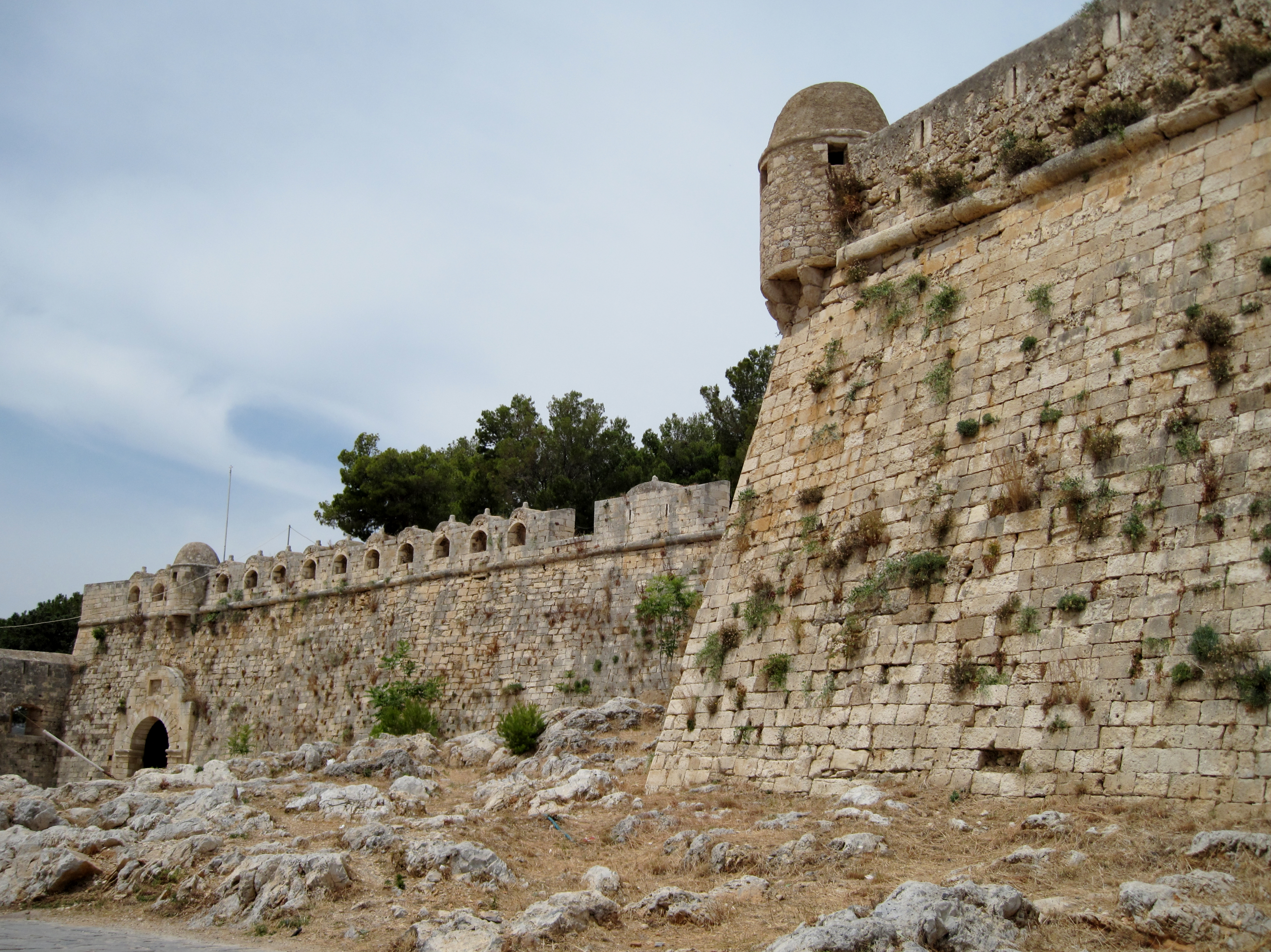 Eingangsbereich der Fortezza von Rethymno (Φορτέτζα του Ρεθύμνου), Festungsanlage innerhalb der Stadt Rethymno, Regionalbezirk Rethymno, Kreta, Griechenland